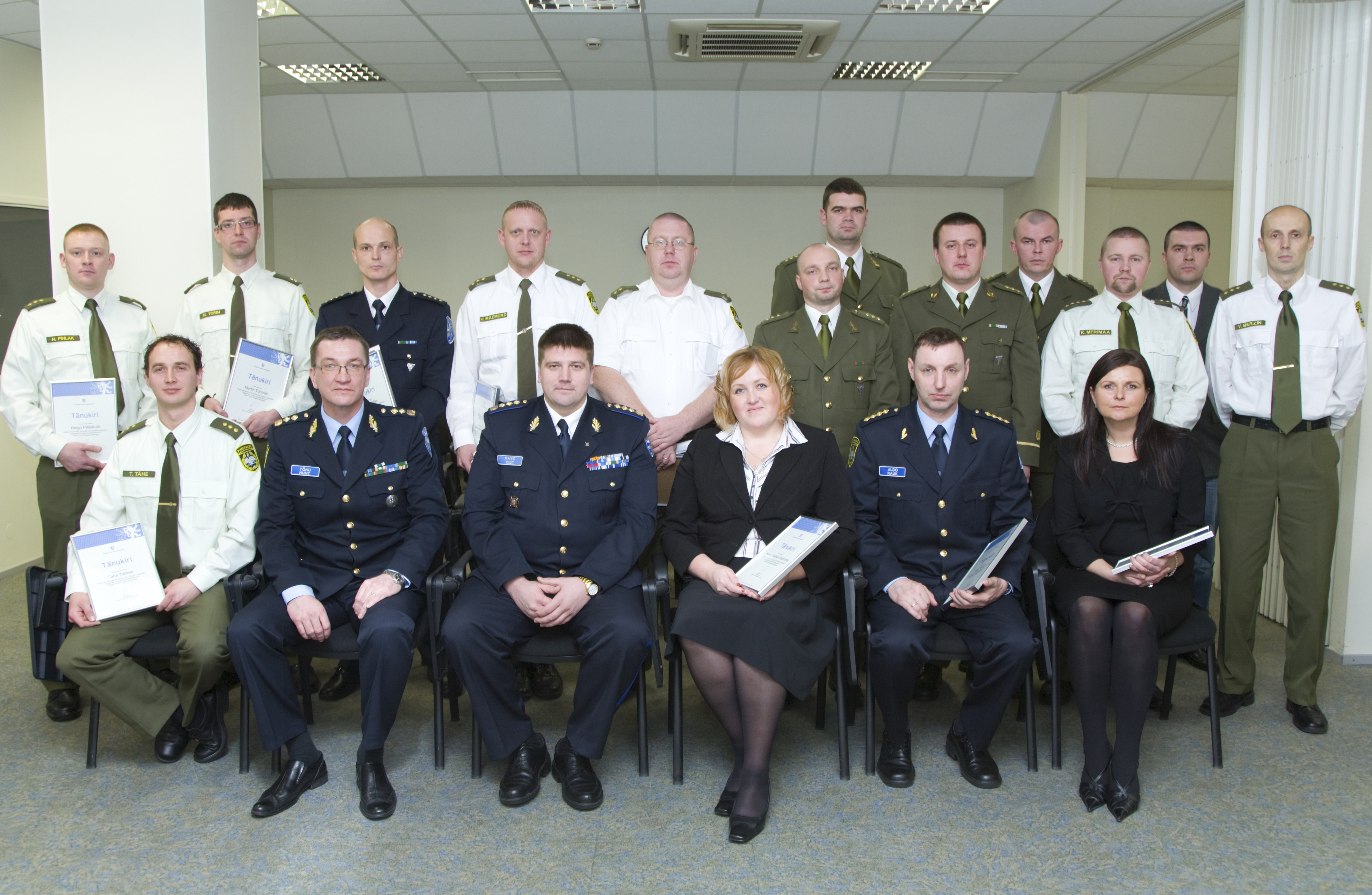 RABIT ühisoperatsioonil osalenute tunnustamine.